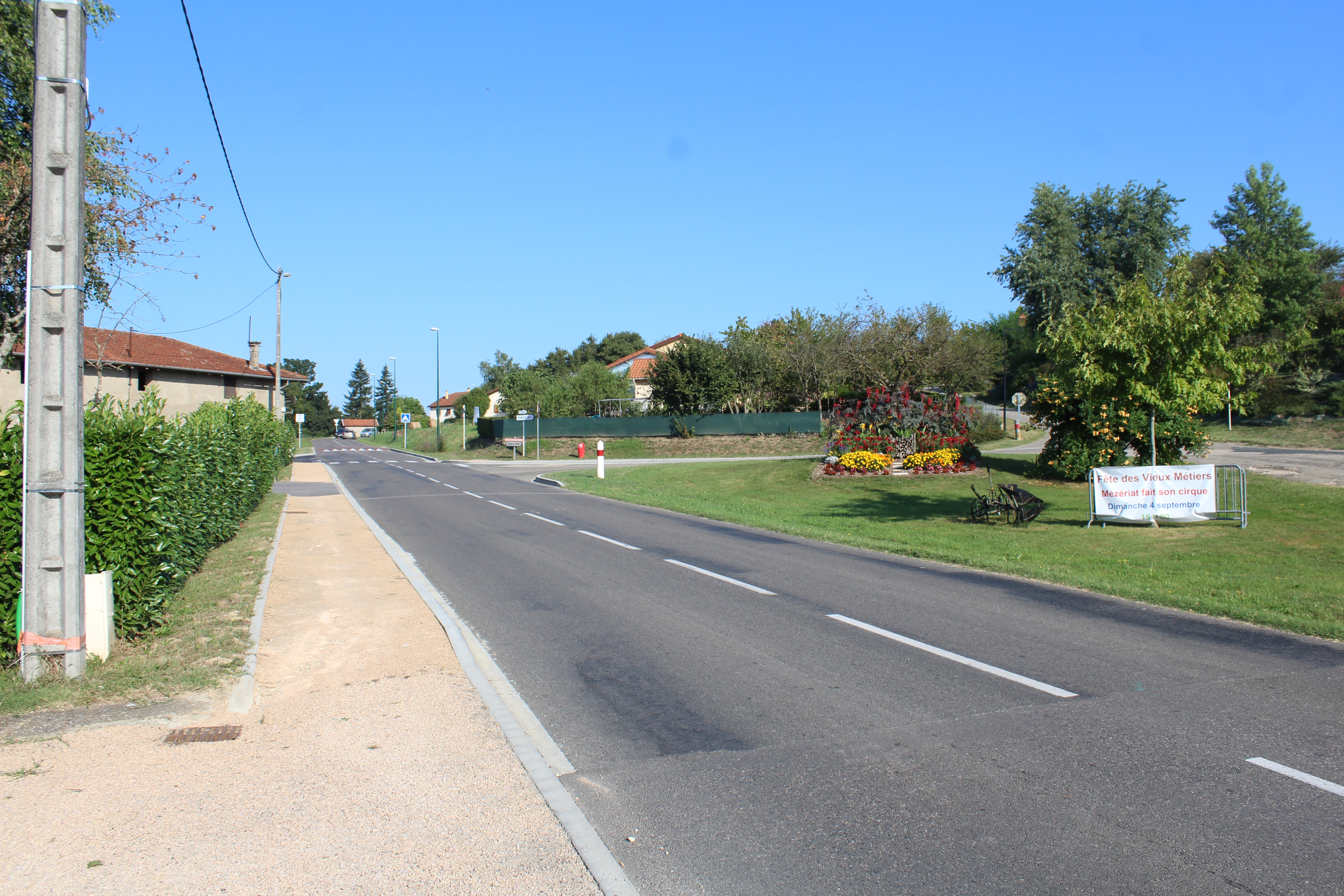 La route départementale D26 à Chaveyriat.